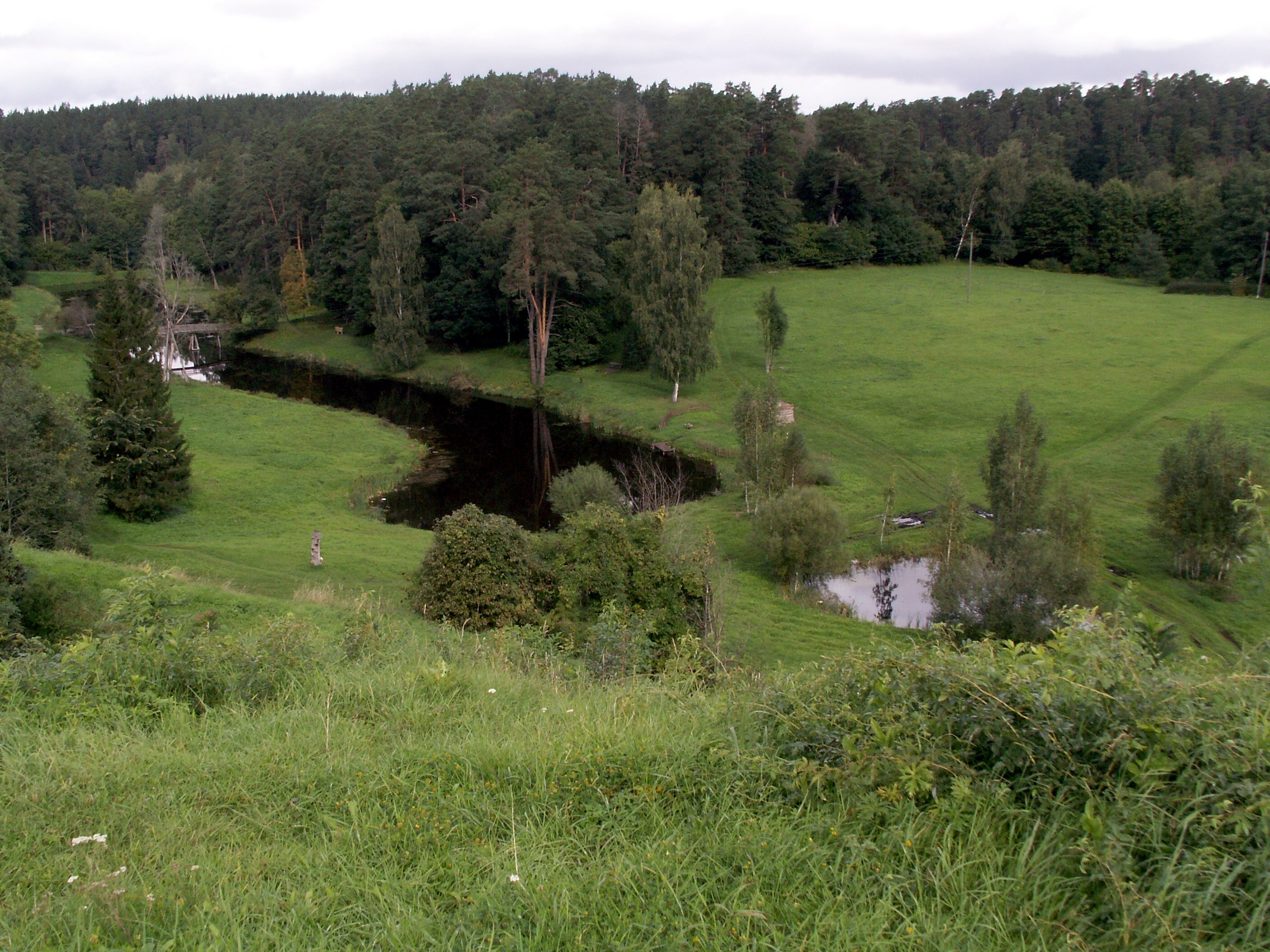 Tervetės piliakalnis, Tervetė, Tervetės pagastas, Latvija